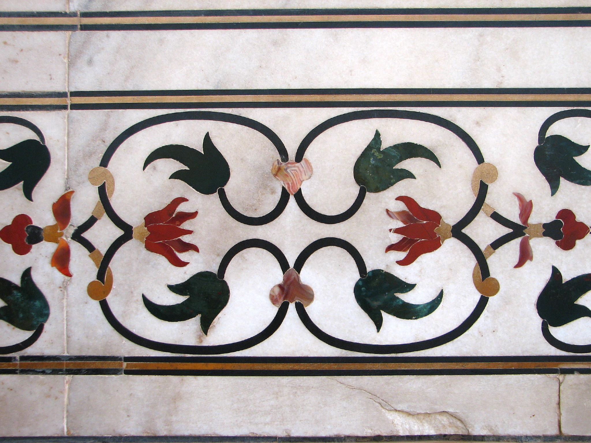 Taj Inlay 05